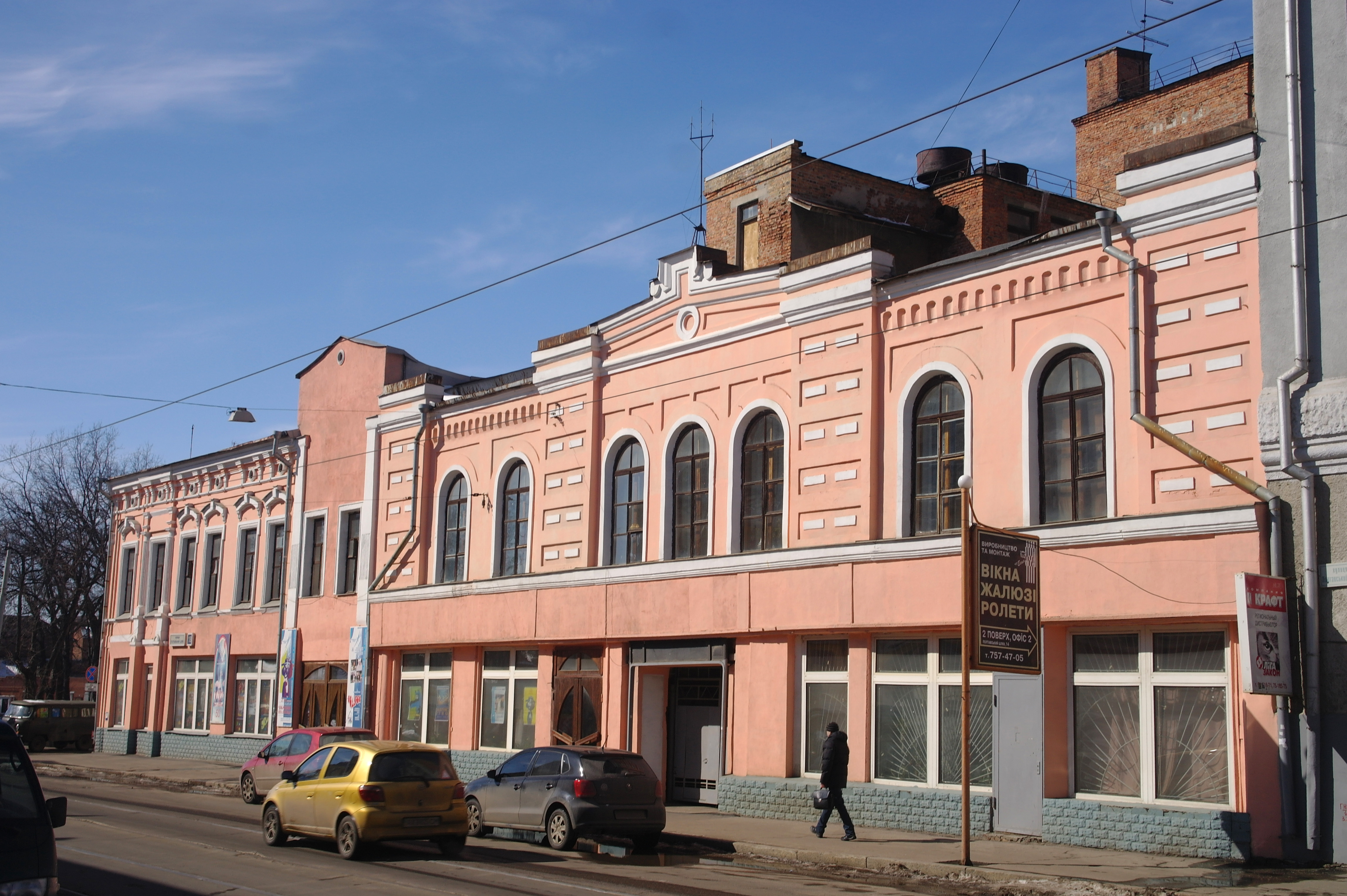 Харків, Потавський шлях, 18